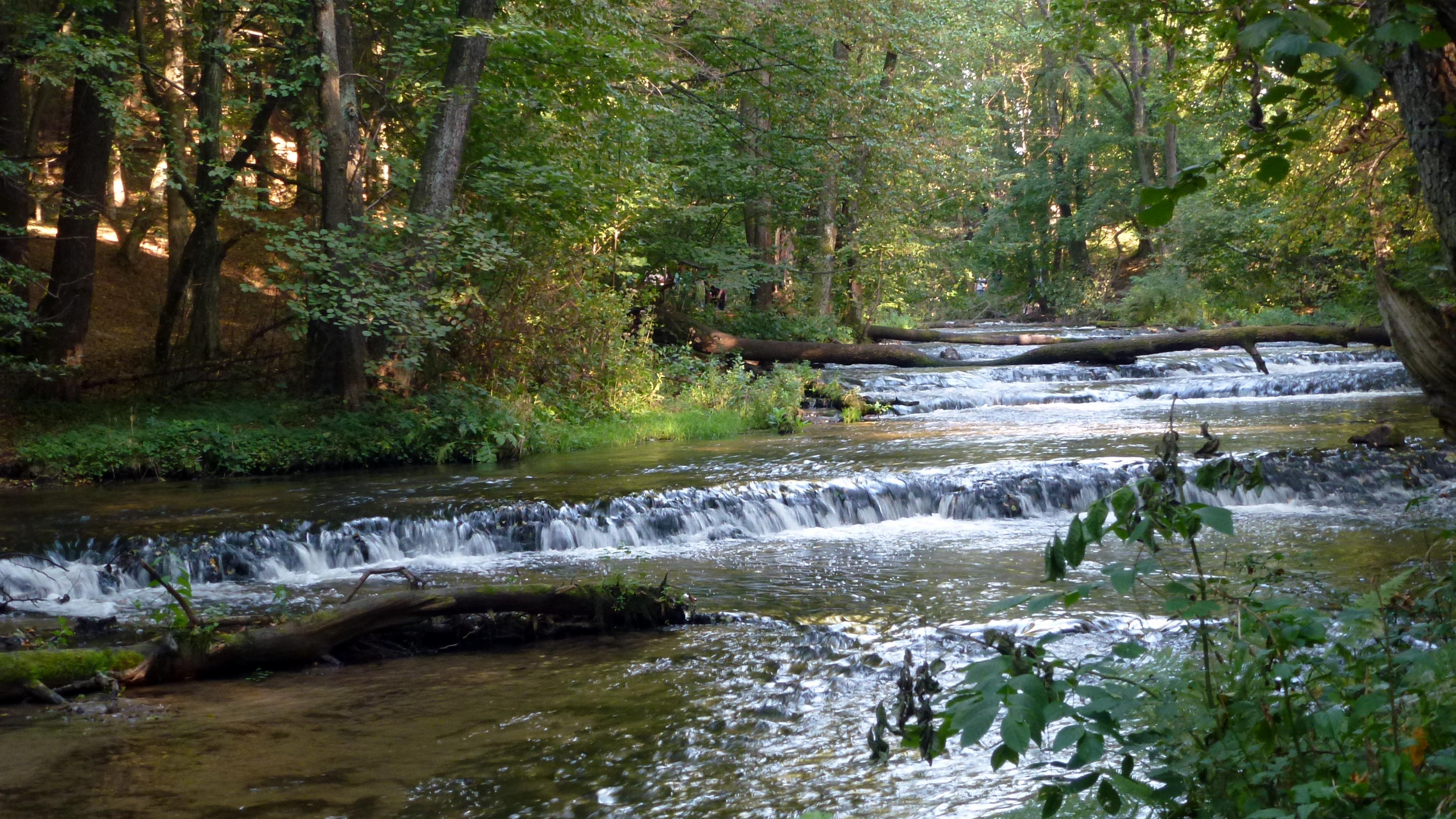 Szumy w rezerwacie "Nad Tanwią"